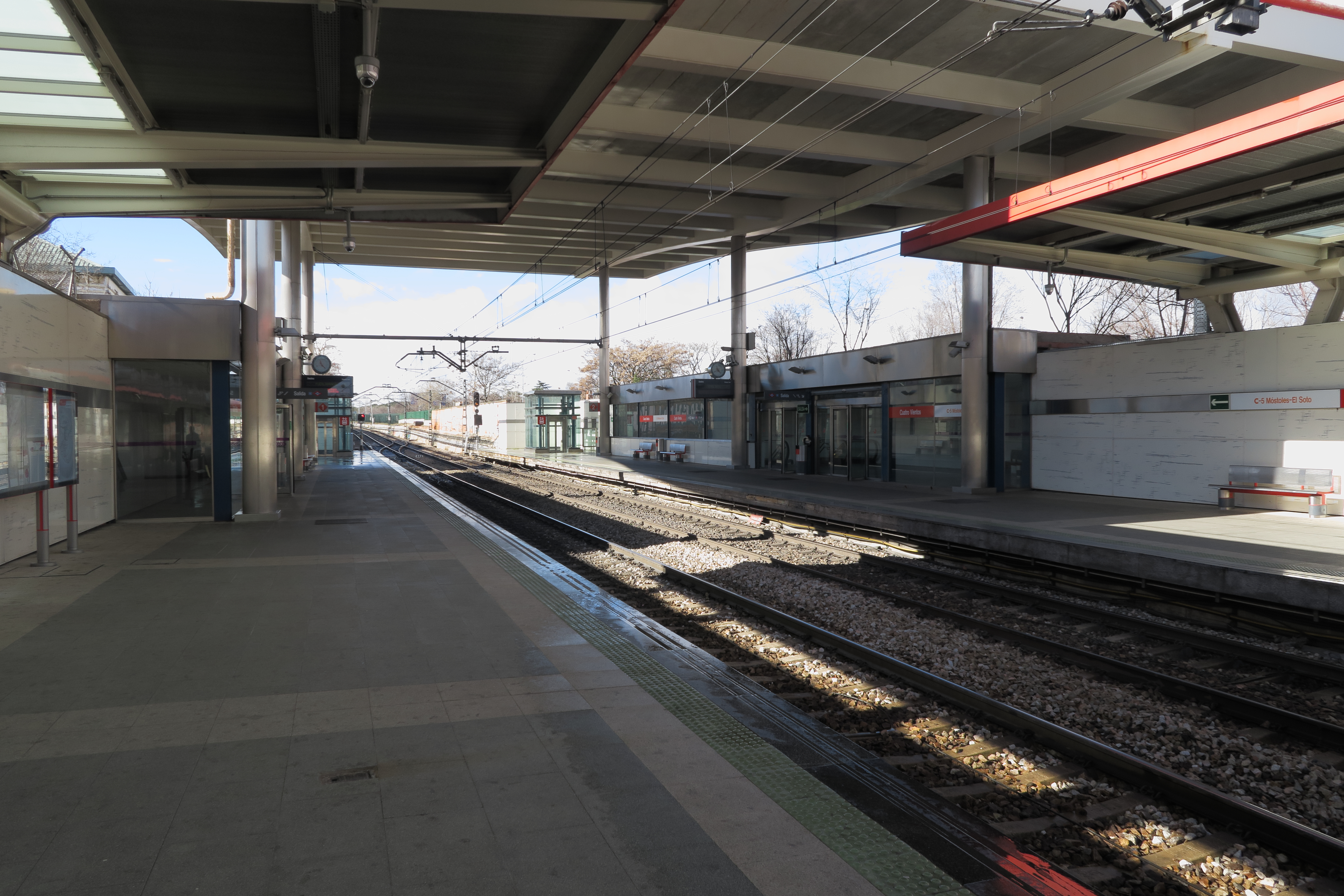 Estación de Cuatro Vientos